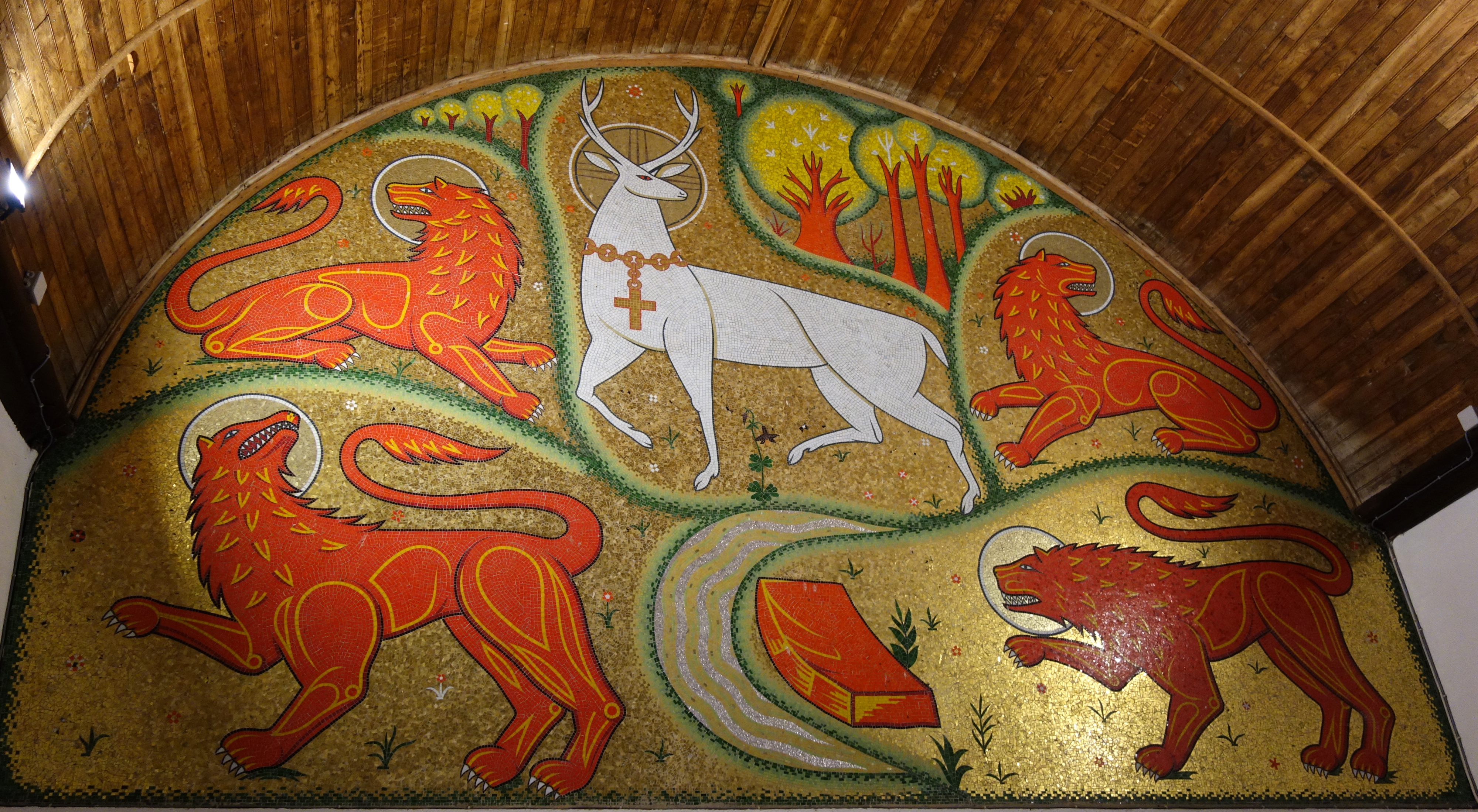 Dans la culture chrétienne, le cerf blanc symbolise le Christ peint ici entouré des quatre lions qui représentent les quatre évangélistes...